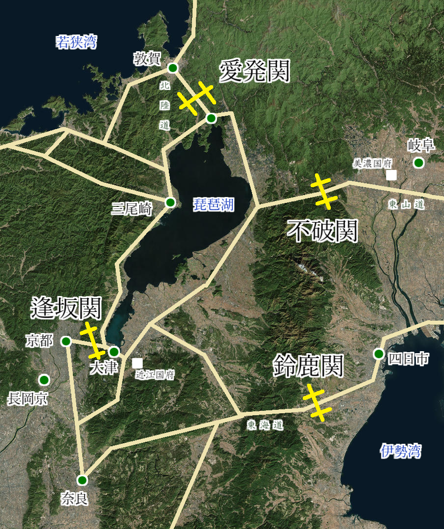 三関（さんげん）の位置を示した地図。三関とは、日本の古代に、畿内周辺に置かれた代表的な3つの関所、鈴鹿関・不破関・愛発関（後に逢坂関）のこと。